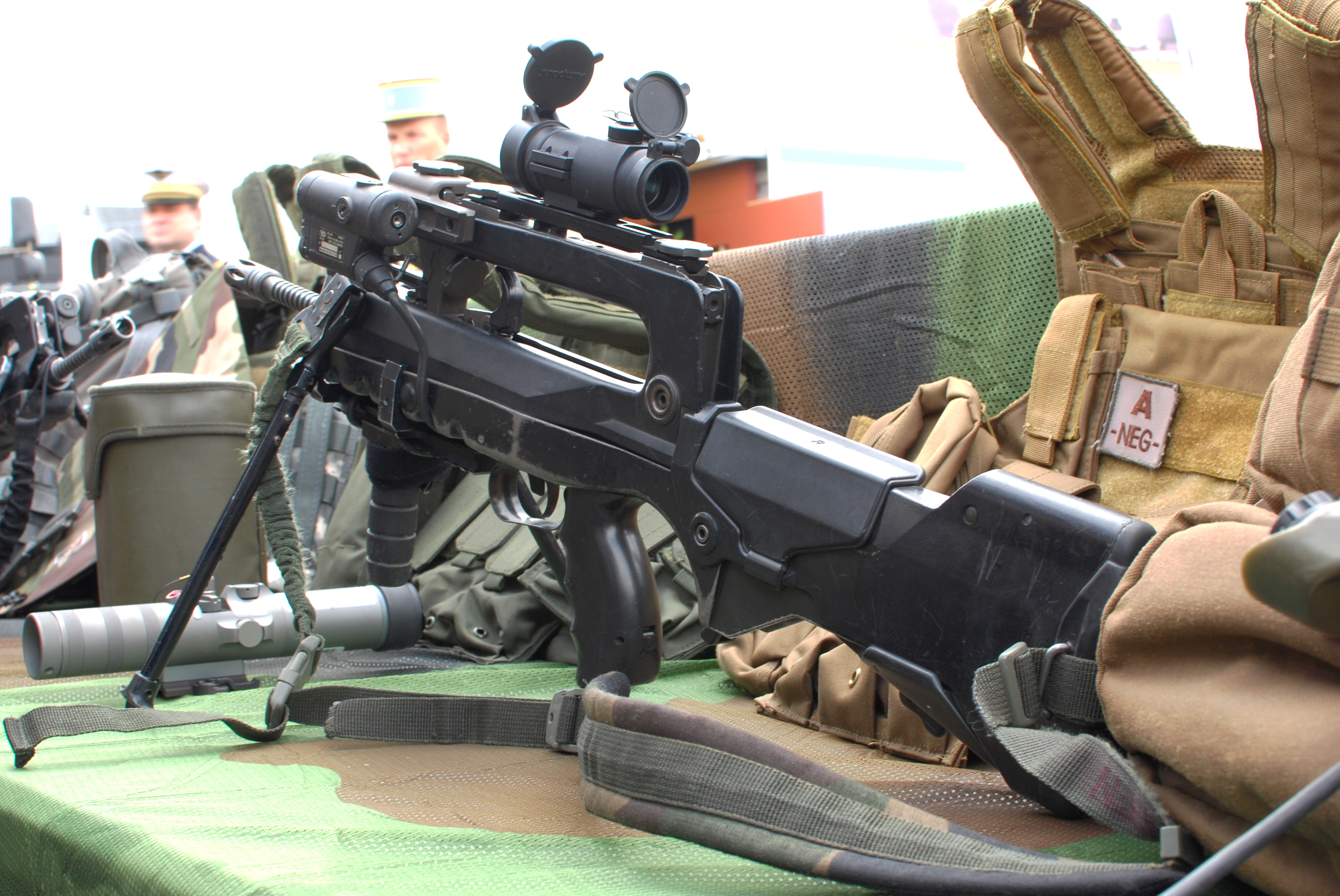 Fusil d'assaut famas doté d'une lunette, d'un désignateur laser et d'une poignée frontale ; photographié au Salon du Bourget